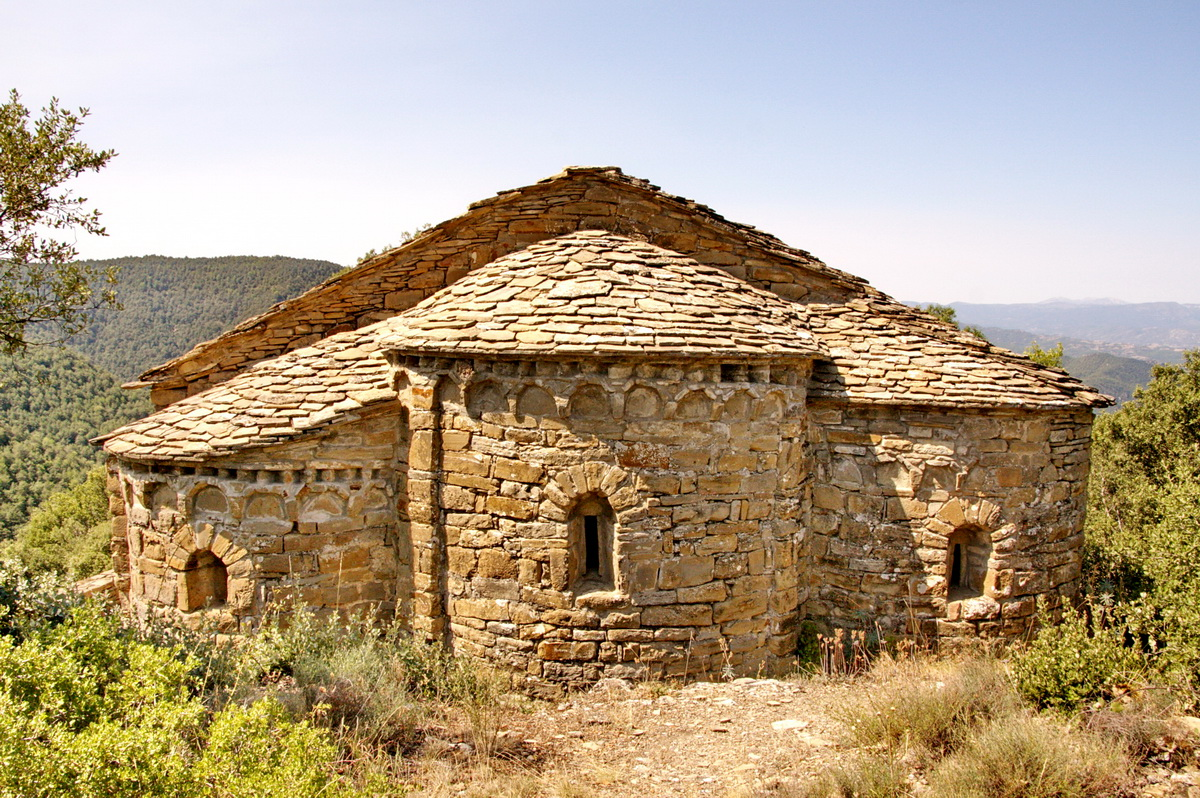 Ermita de Sant Anton a Pano (Ribagorça, Osca)